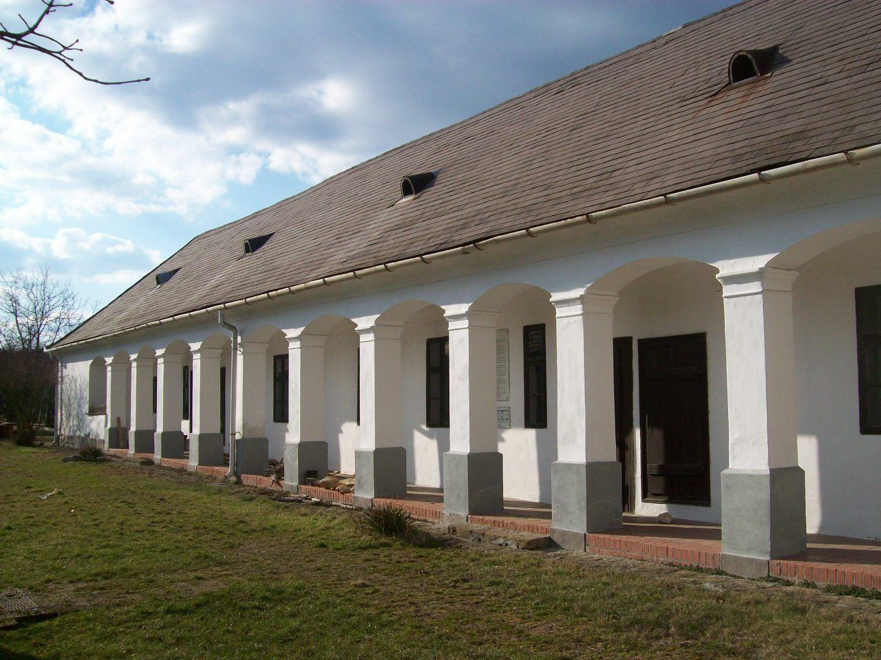 Az Orbán-ház Szilvásváradon